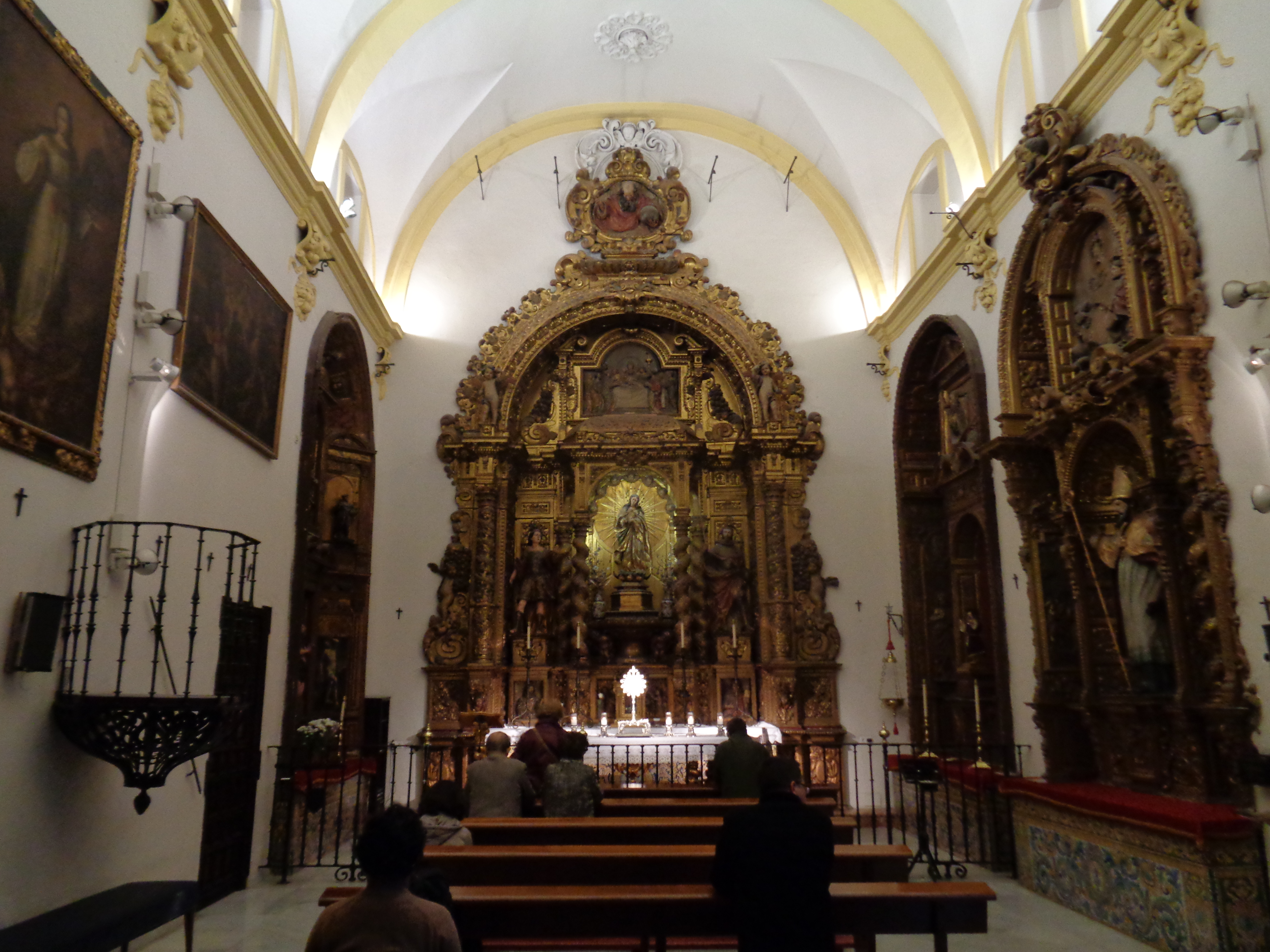 Capilla de San Onofre, que es la única estancia que queda del convento Casa Grande de San Francisco, en la actual Plaza Nueva. Sevilla, Andalucía, España.